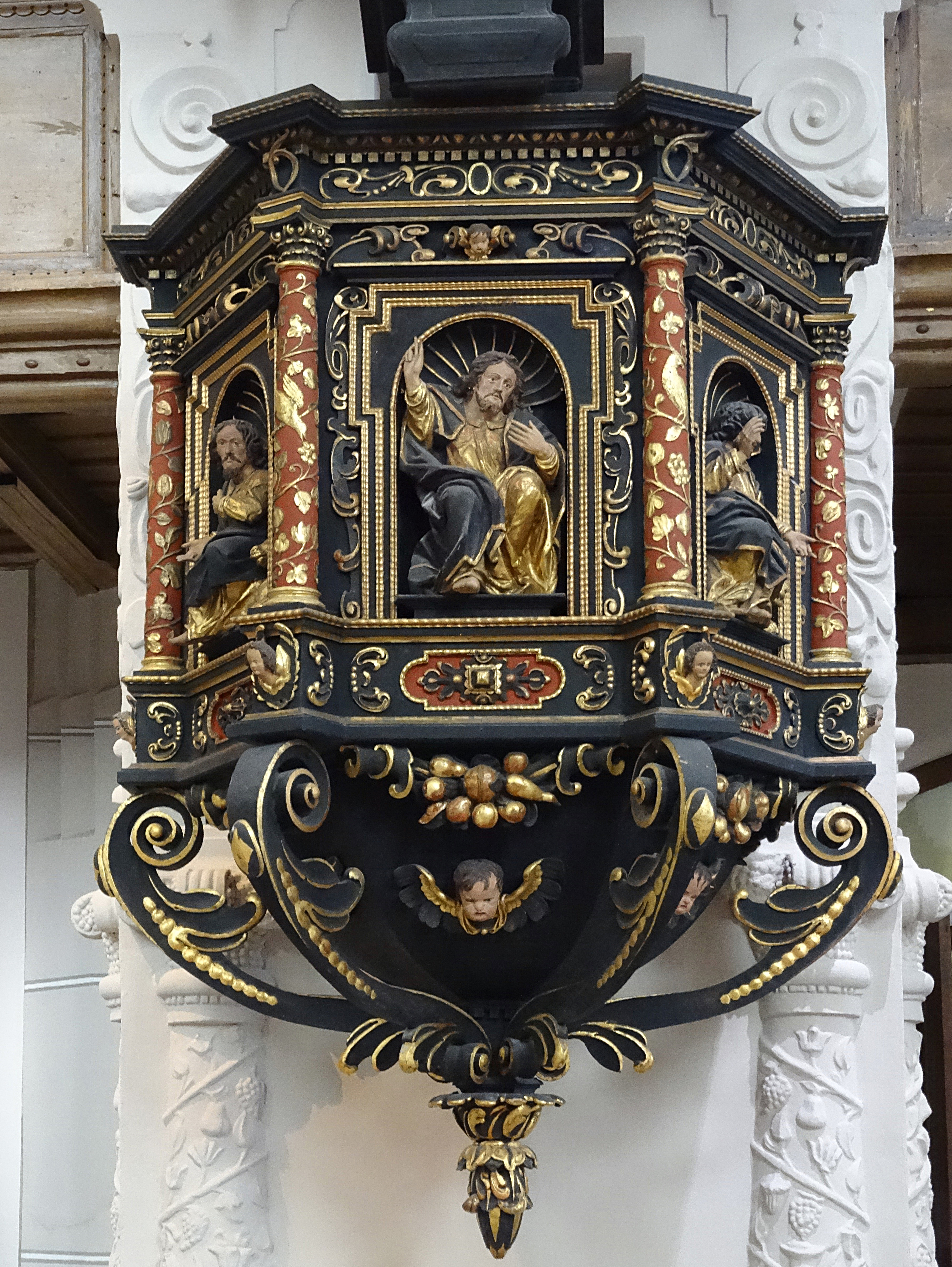 Die Kanzel von Georg Bahns und Hans Bubenick (1669) in der Klosterkirche Zittau